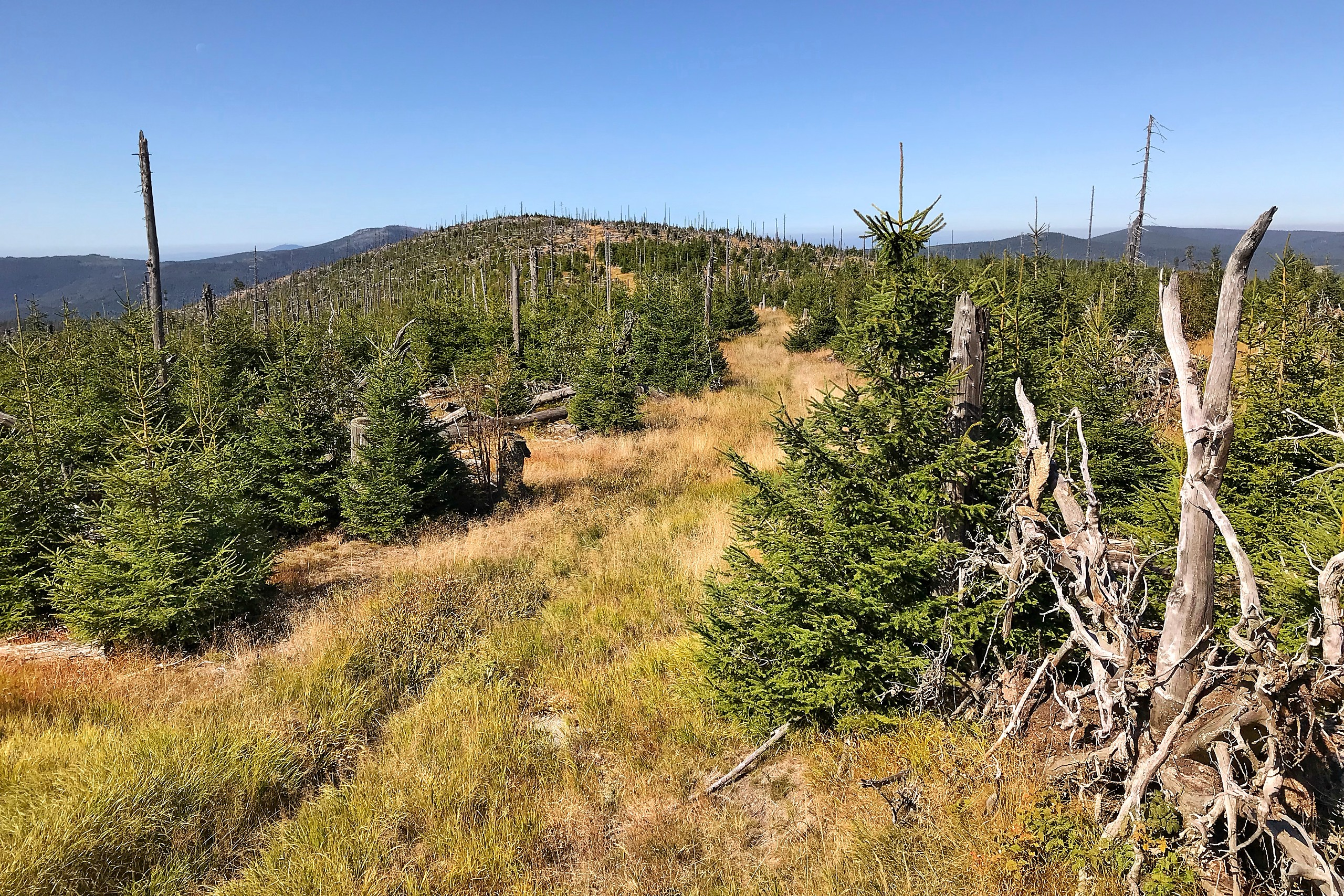 Polom (1295 m) na Šumavě